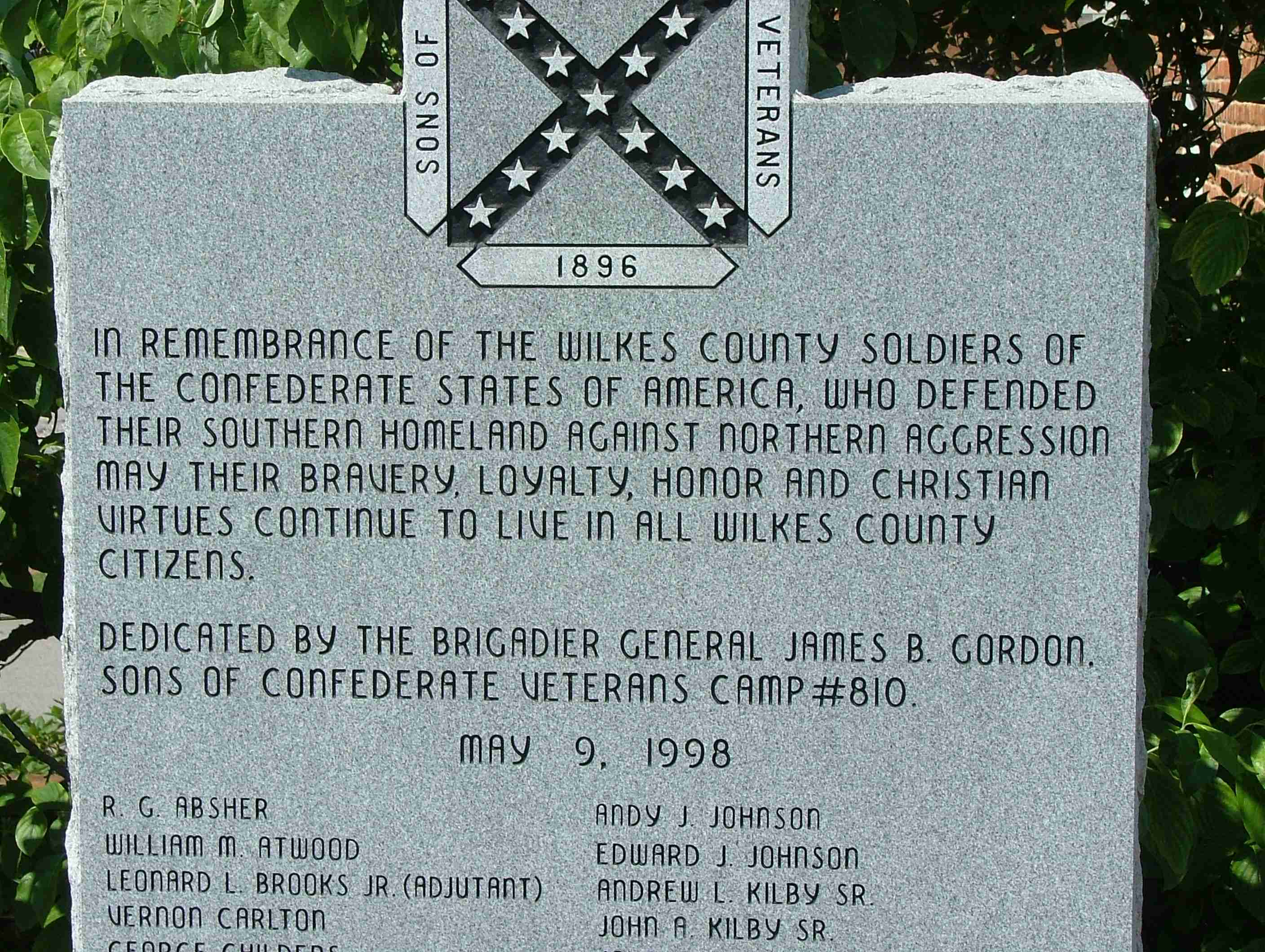 Mindesten for faldne i den amerikanske borgerkrig. Mindestenen står foran Old Wilkes Jail i Wilkesboro, County-hovedstad i Wilkes County i North Carolina.